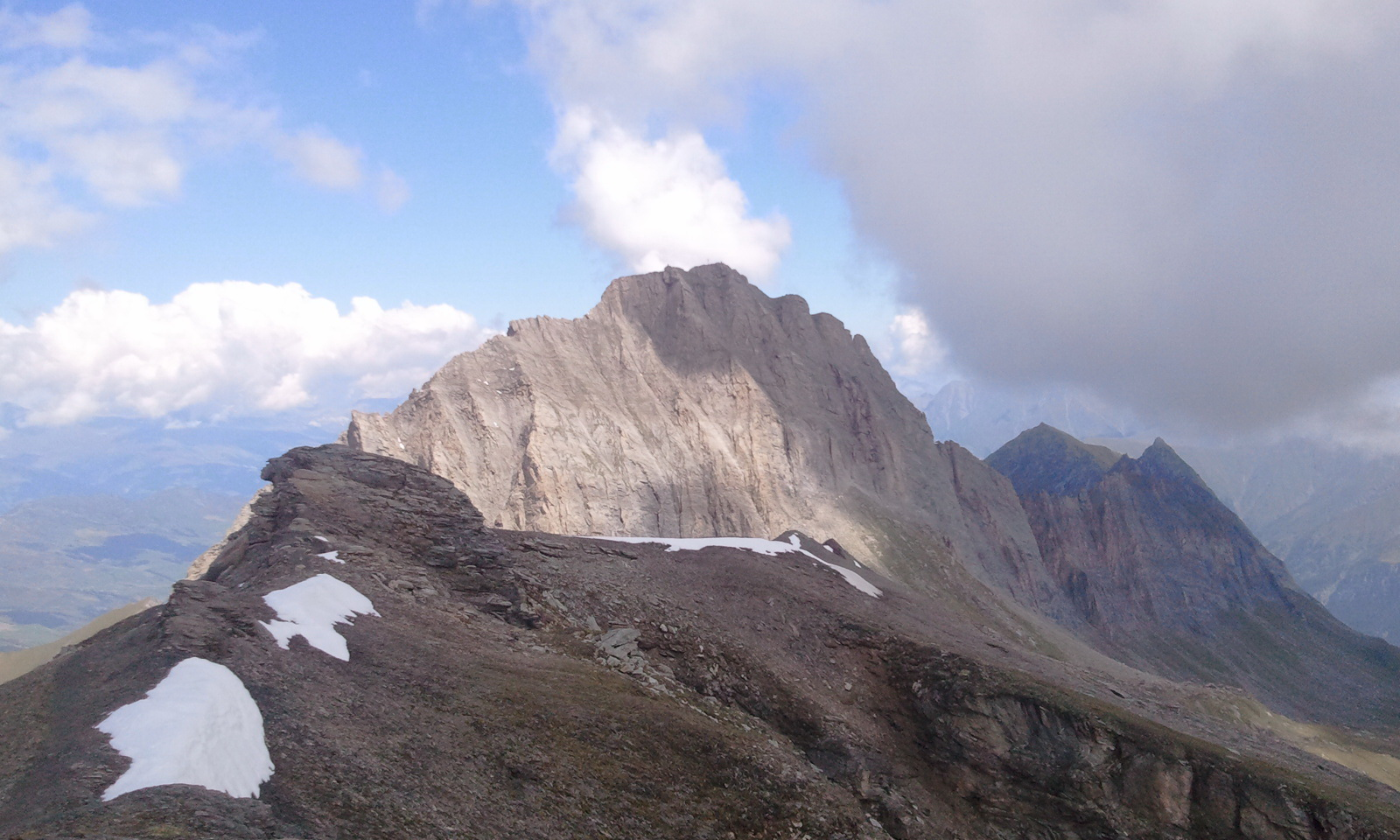 Blick vom Faltschonhorn auf den Piz Aul. Kanton Graubünden, Schweiz.